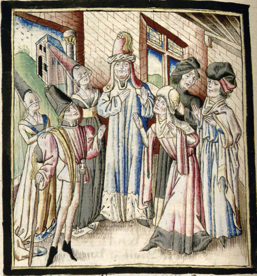 ChampionDesDames-Grenoble-Ms0352-f053v